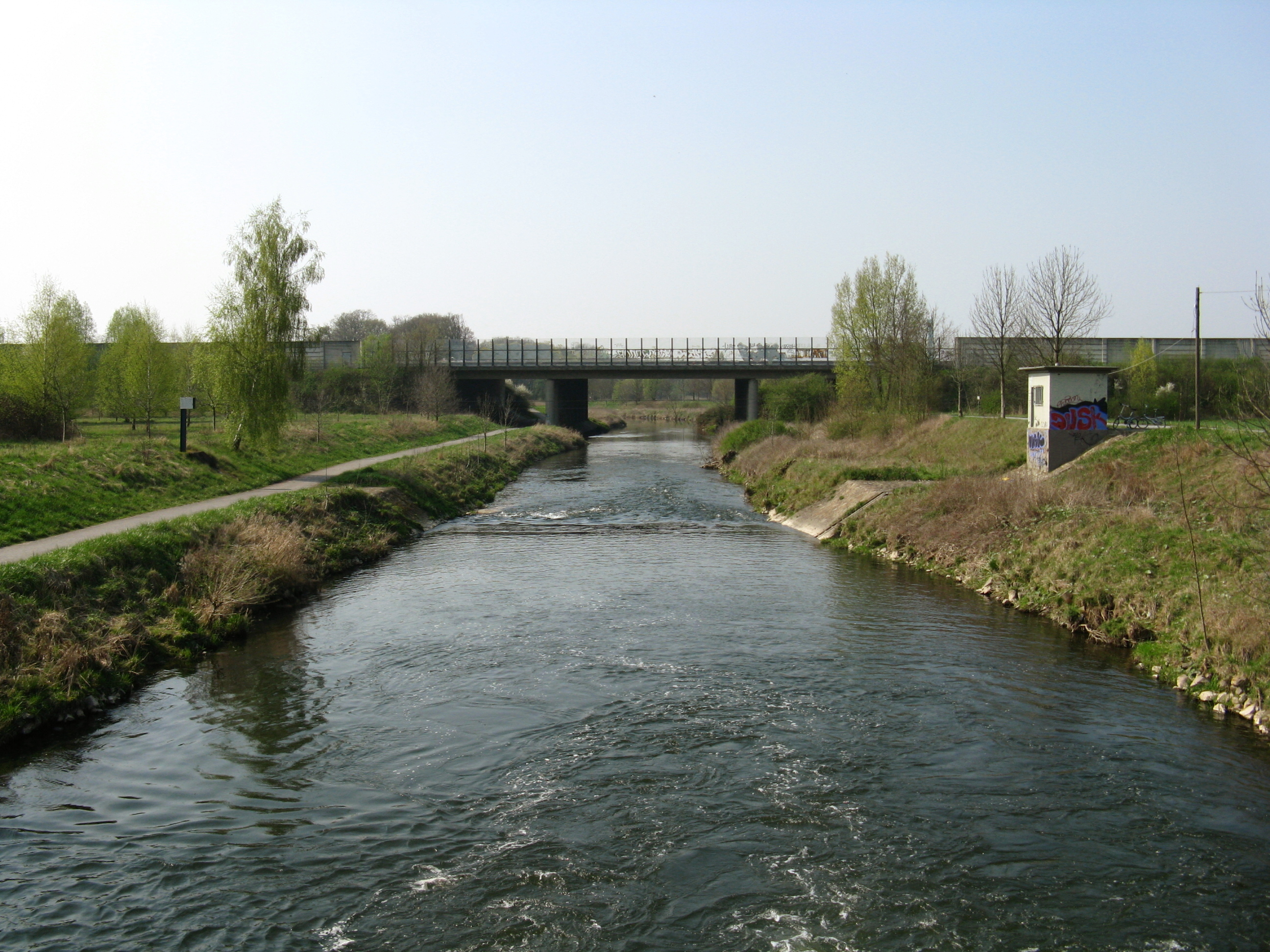 Die ausgebaute Werre in Ahmsen. Zu sehen sind die Querung der A2 und der Pegel Ahmsen.